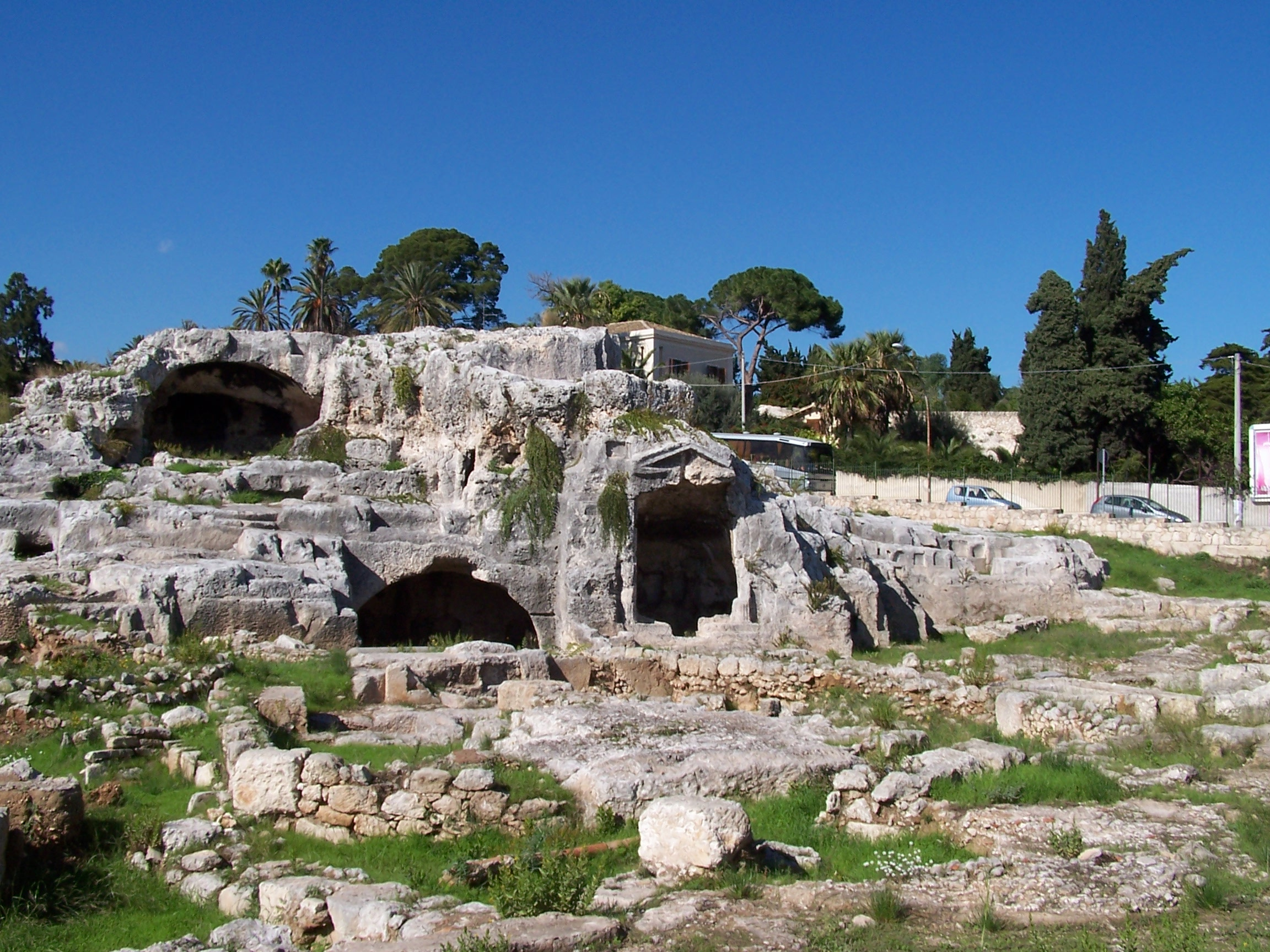 La cosiddetta "tomba di Archimede" a Siracusa, in realtà un colombario di età imperiale romana.